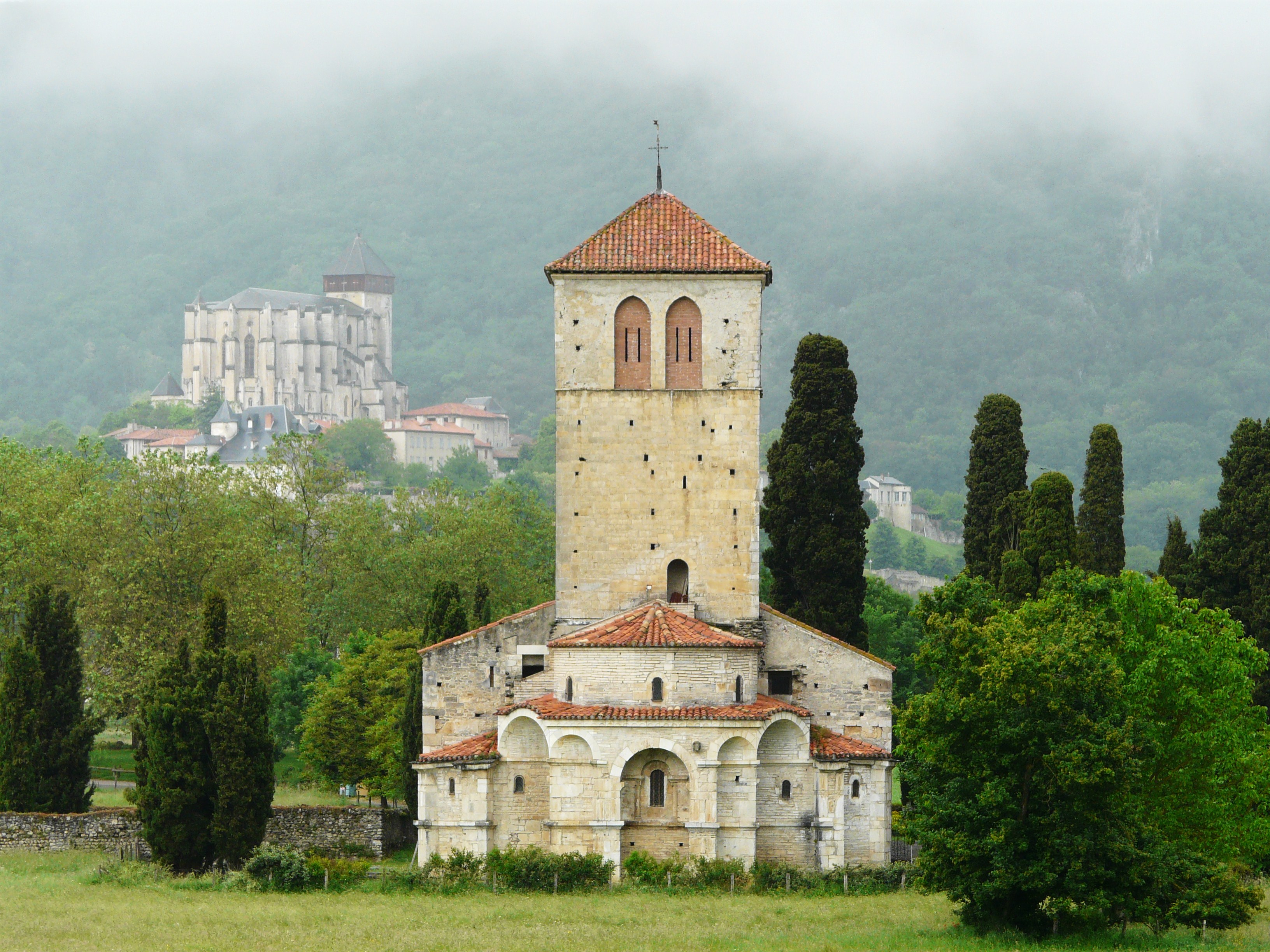 La basilique Saint-Just de Valcabrère, Haute-Garonne, France. Au second plan, le village de Saint-Bertrand-de-Comminges et sa cathédrale.